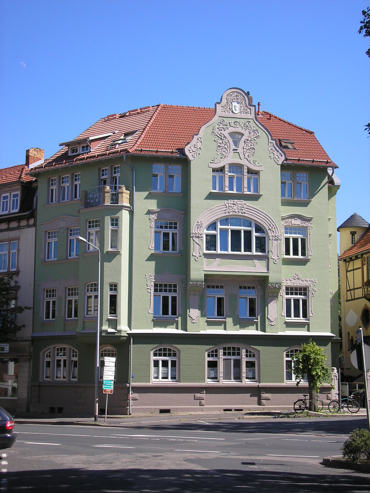 Das Gebäude "Homburger Platz 1" in Ilmenau (Thüringen). Baustil: Jugendstil.